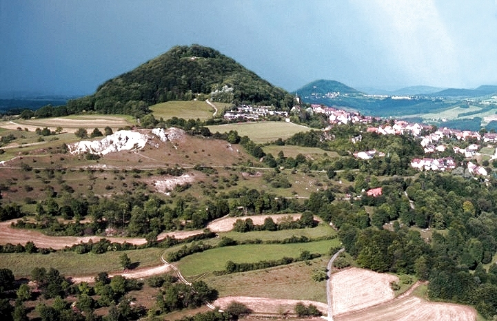 Der Hohenstaufen bei Göppingen.